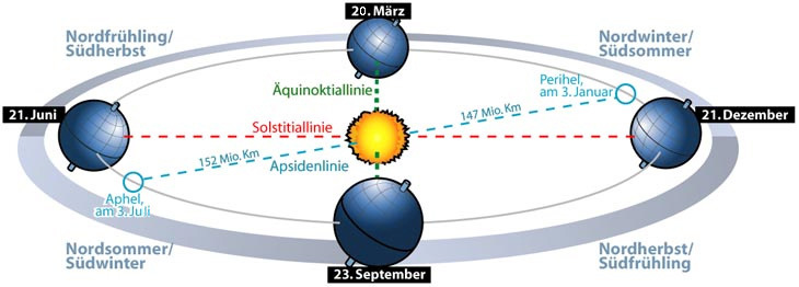 Jahreszeitenschema, Übersicht über die Referenzlinien der Erdbahn